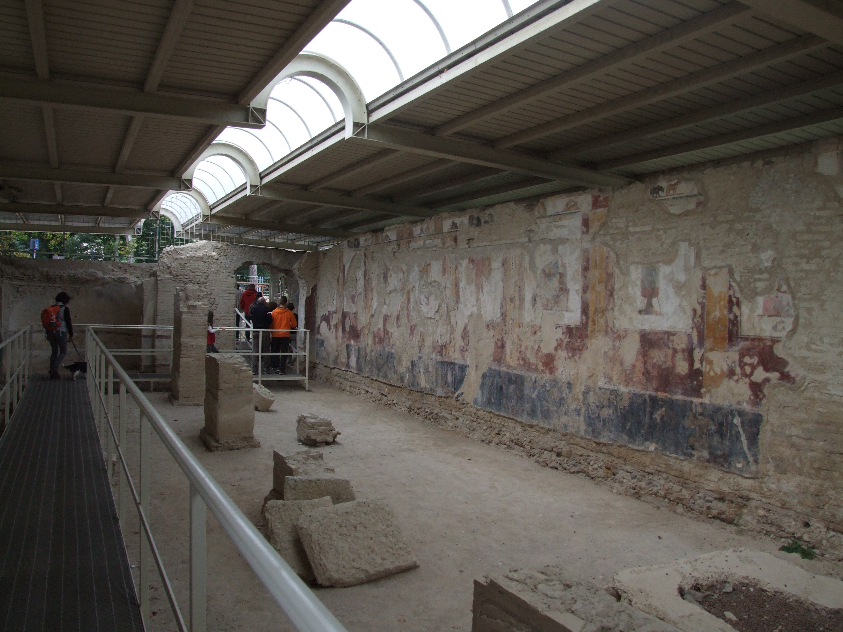 Il braccio meridionale del Criptoportico, permette ancora di apprezzare le interessanti decorazioni pittoriche di età tiberiana, riferibili al III stile pompeiano, divise su tre fasce, delle quali quella superiore quasi completamente perduta. La parete presenta, sopra ad uno zoccolo decorato con pannellature di colore scuro, una serie di quadri raffiguranti trofei militari nei quali si distinguono ancora elmi, lance e scudi. Questi riquadri sono separati da listelli verticali decorati da candelabri. Nella fascia superiore, conservata solo in parte, la decorazione presenta raffigurazioni naturalistiche con animali esotici, scene di caccia e maschere lunari. This is a photo of a monument which is part of cultural heritage of Italy.